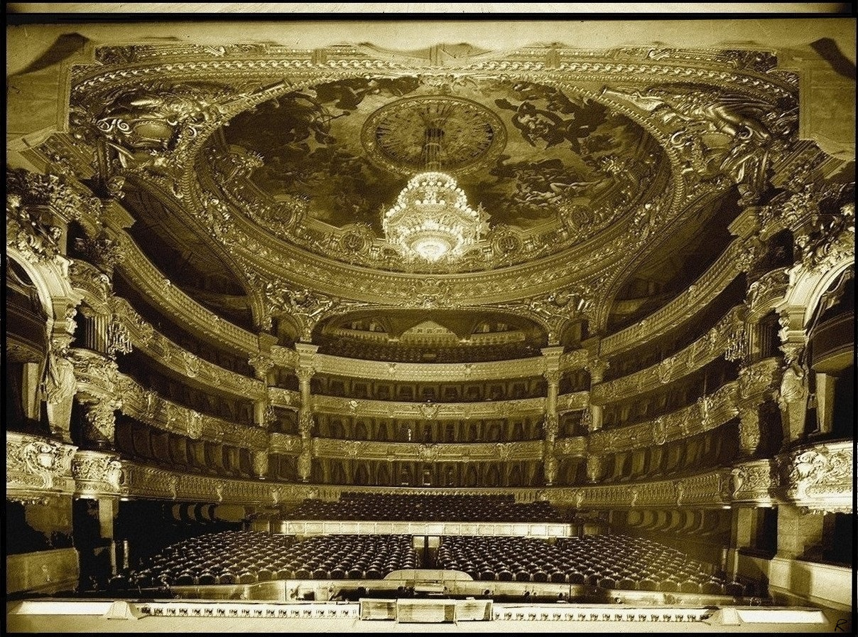 La salle de spectacle photographiée depuis la scène